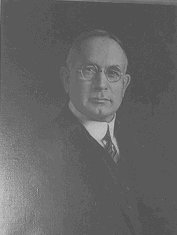 Governor John H. Bartlett. From